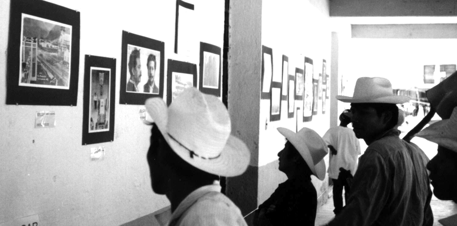 Exposición gráfica sobre magonismo. "Jornadas Magonistas por la Autonomía", Eloxoxhitlán de Flores Magón, Oaxaca.